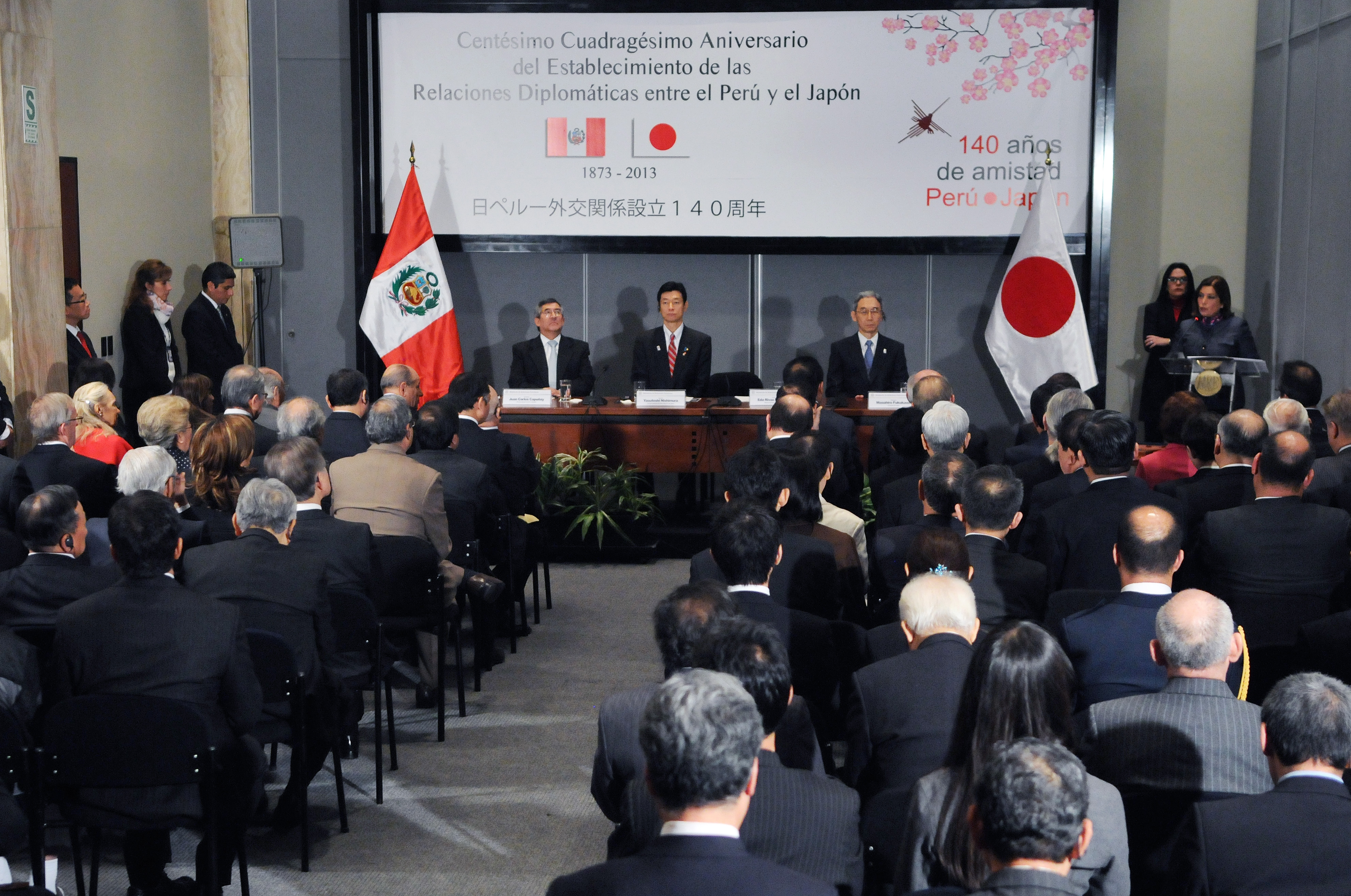 Como parte de las actividades para conmemorar el “Centésimo Cuadragésimo Aniversario del Establecimiento de las Relaciones Diplomáticas entre el Perú y el Japón”, la Ministra de Relaciones Exteriores, Eda Rivas Franchini, encabezó hoy, en la sede de la Cancillería, una ceremonia oficial que contó con la presencia del Diputado japonés Yasutoshi Nishimura, Enviado Especial del Primer Ministro Shinzo Abe; y del Embajador de Japón en el Perú, Masahiro Fukukawa, entre otras altas autoridades, empresarios japoneses y miembros de la comunidad nipona en nuestro país. Sigue leyendo la nota en nuestra Web: bit.ly/1bTKnyZ